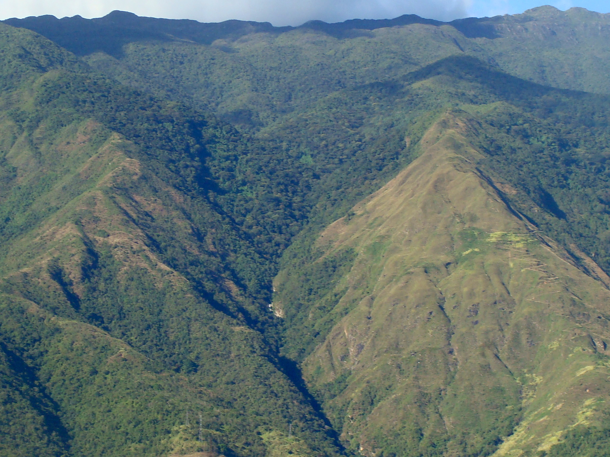 La ladera sur del macizo del Naiguatá, con el pico del mismo nombre a la derecha